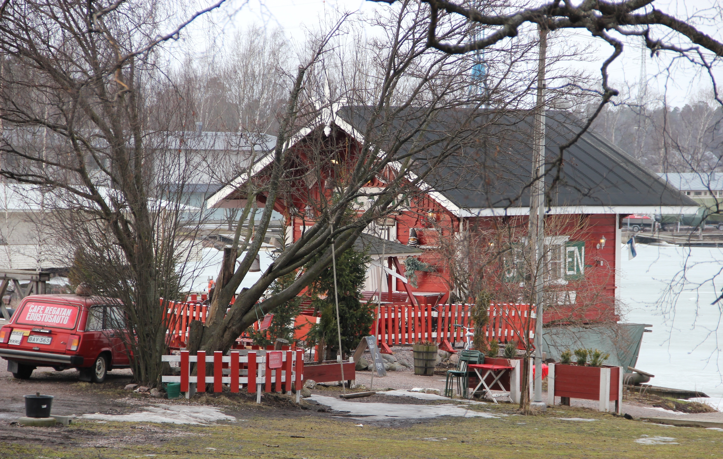 Kahvila Merikannontie 10:ssä Helsingin Töölössä